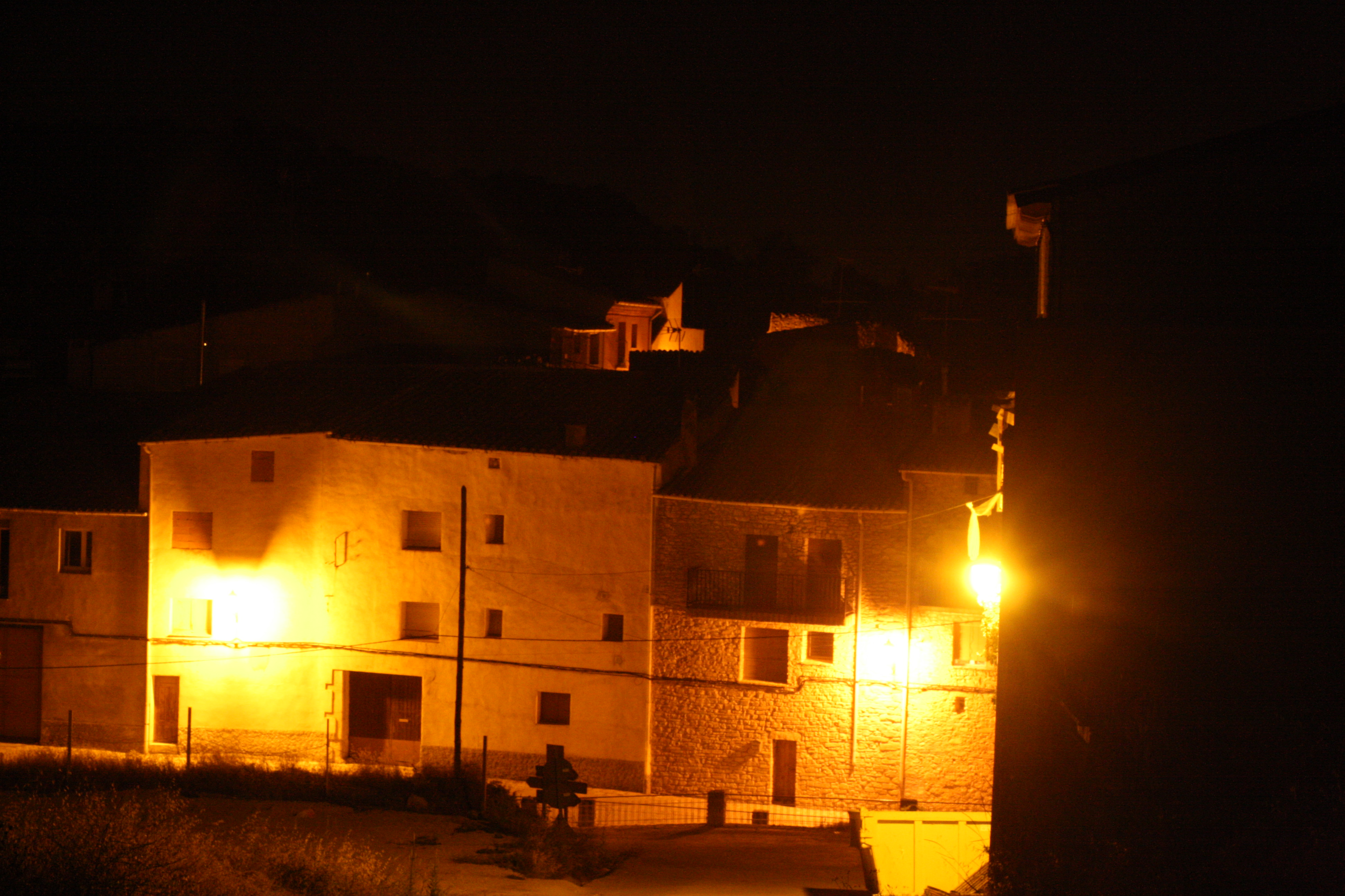 Carrer de Conesa